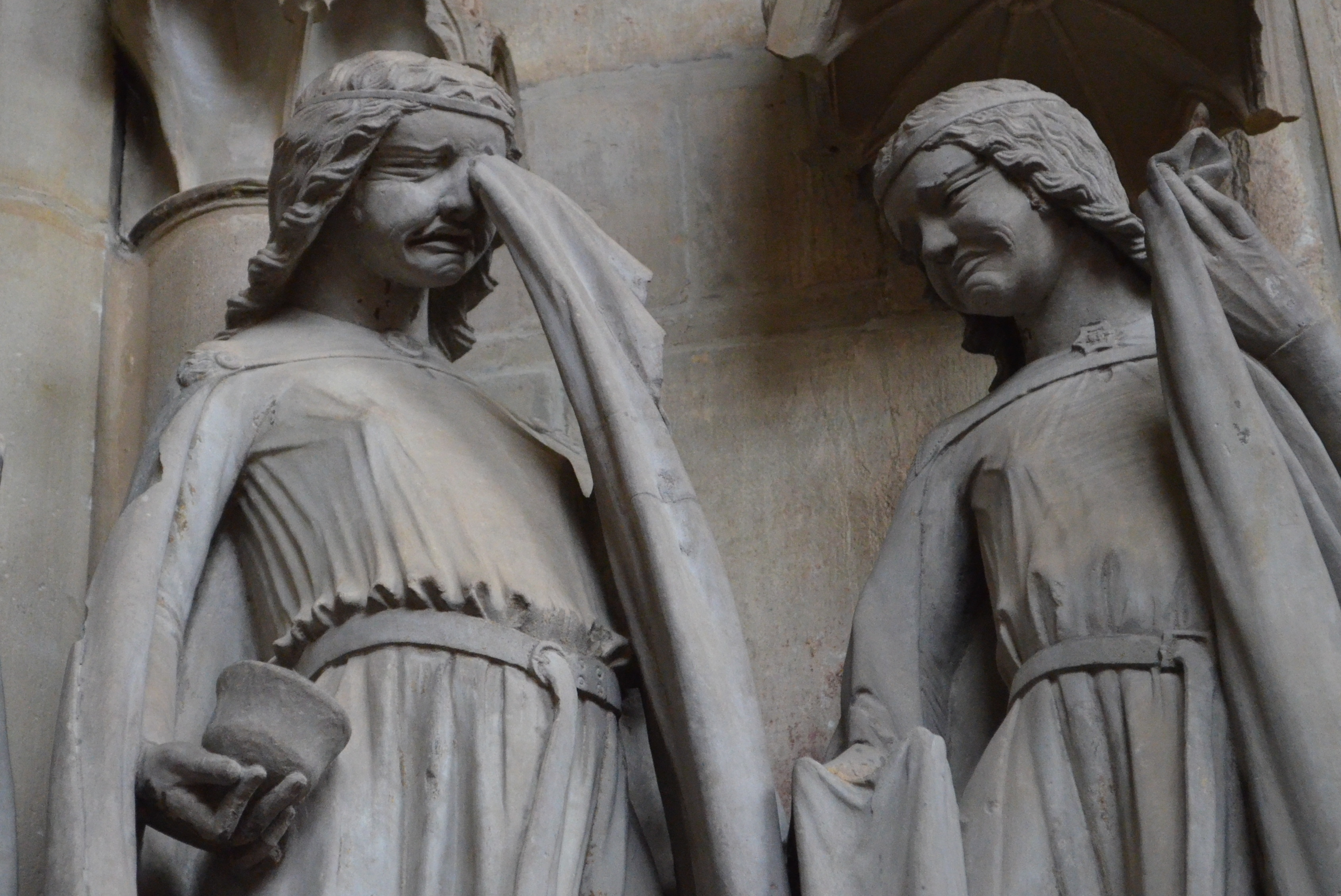 Maagdenburg, domkerk, beelden van dwaze maagden